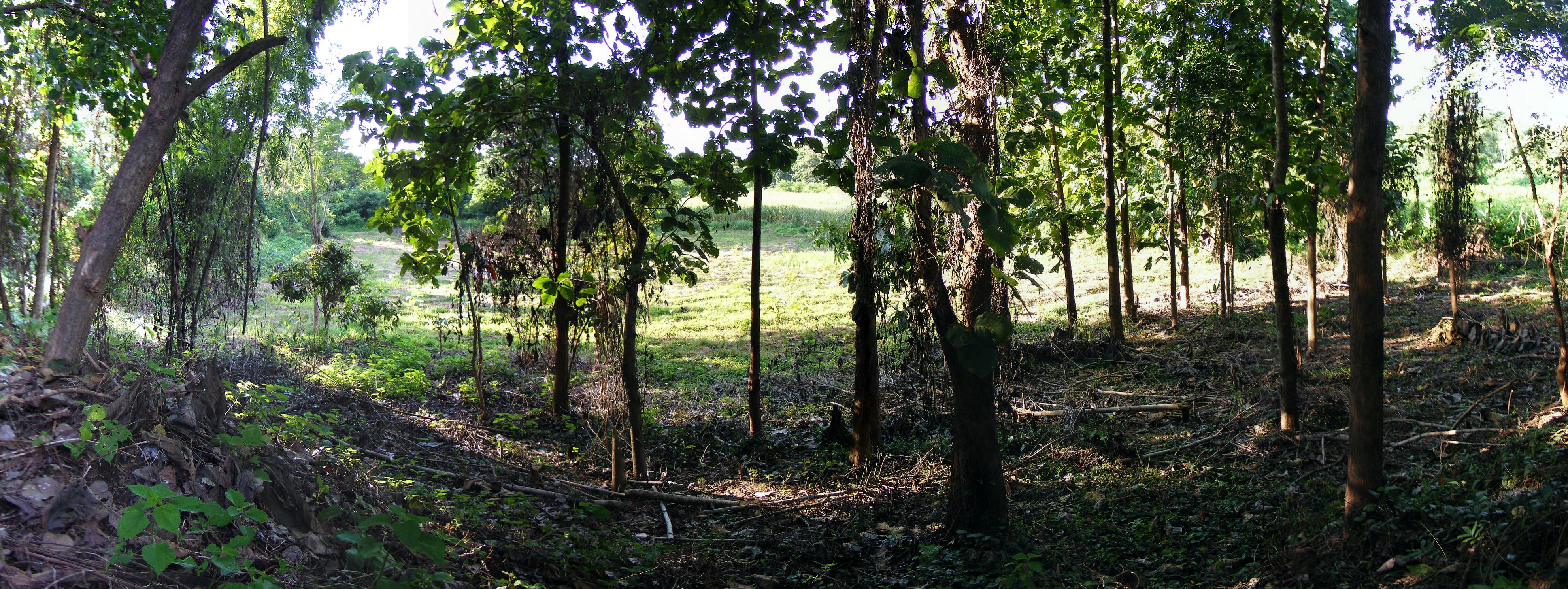 เนินตลิ่งลดระดับท้องแม่น้ำน่านหน้าวัดคุ้งตะเภาเดิม บริเวณที่ตั้งอาคารศาลาการเปรียญวัดคุ้งตะเภาหลังเก่าสมัยธนบุรี ก่อนจะรื้อออกในปี พ.ศ. 2472ถ่ายที่: วัดคุ้งตะเภา หมู่บ้านคุ้งตะเภา ตำบลคุ้งตะเภา อำเภอเมือง จังหวัดอุตรดิตถ์